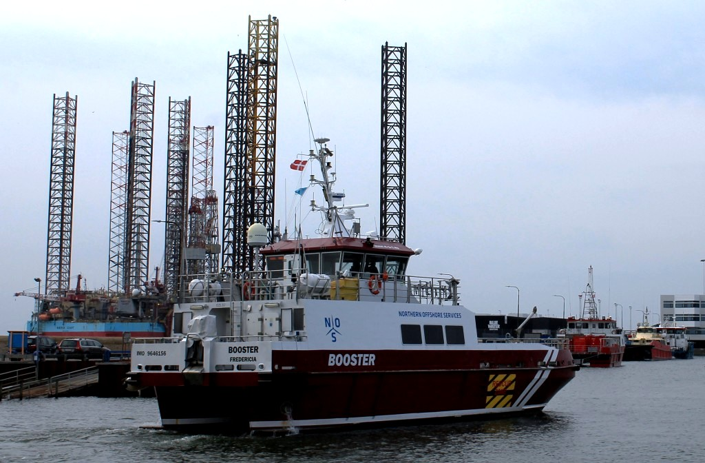 Die Booster einlaufend Esbjerg